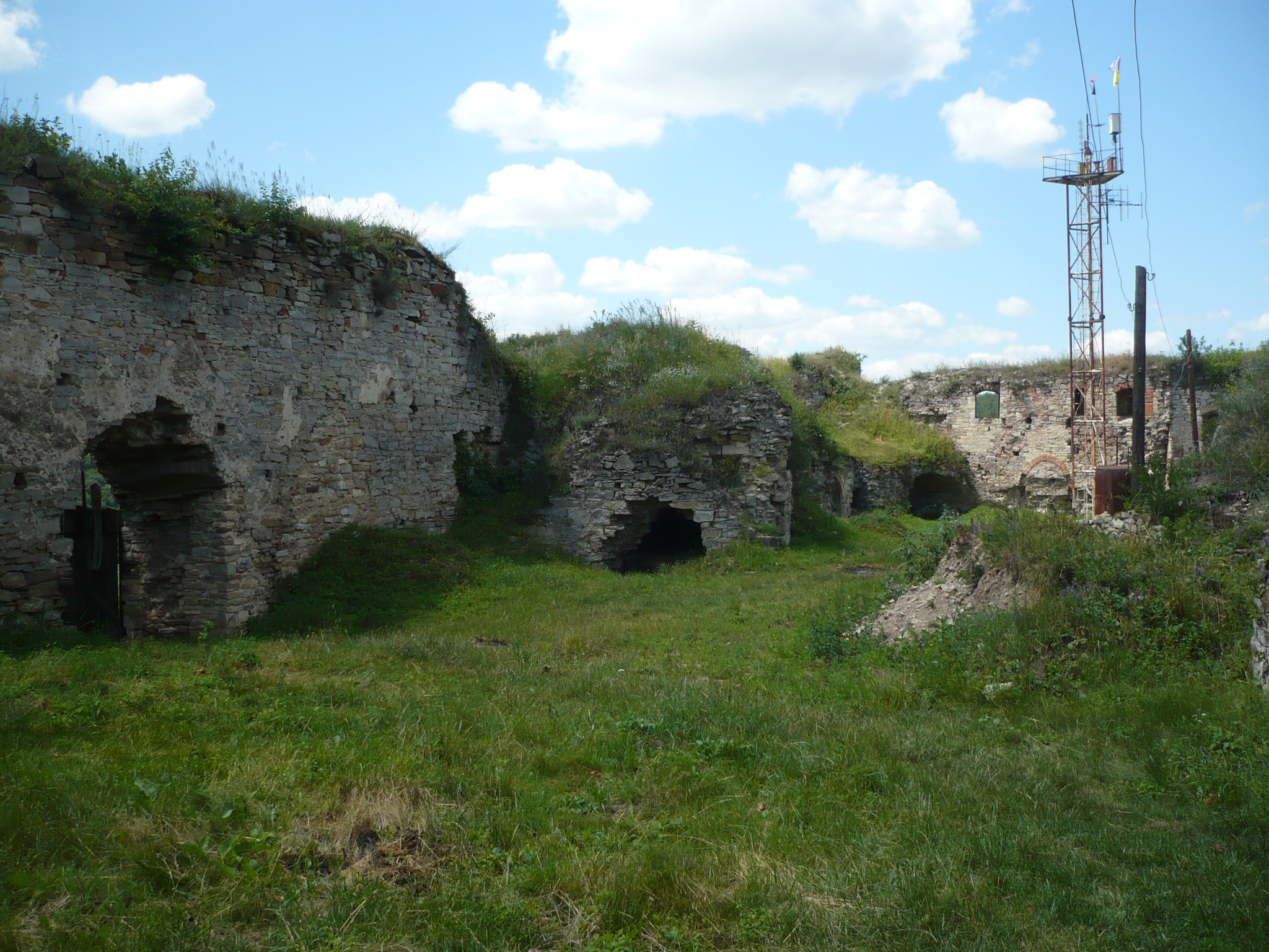 Jazłowiec. Zamek